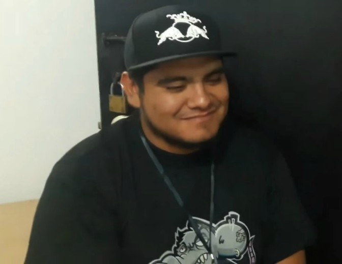 Entrevista al rapero Aczino